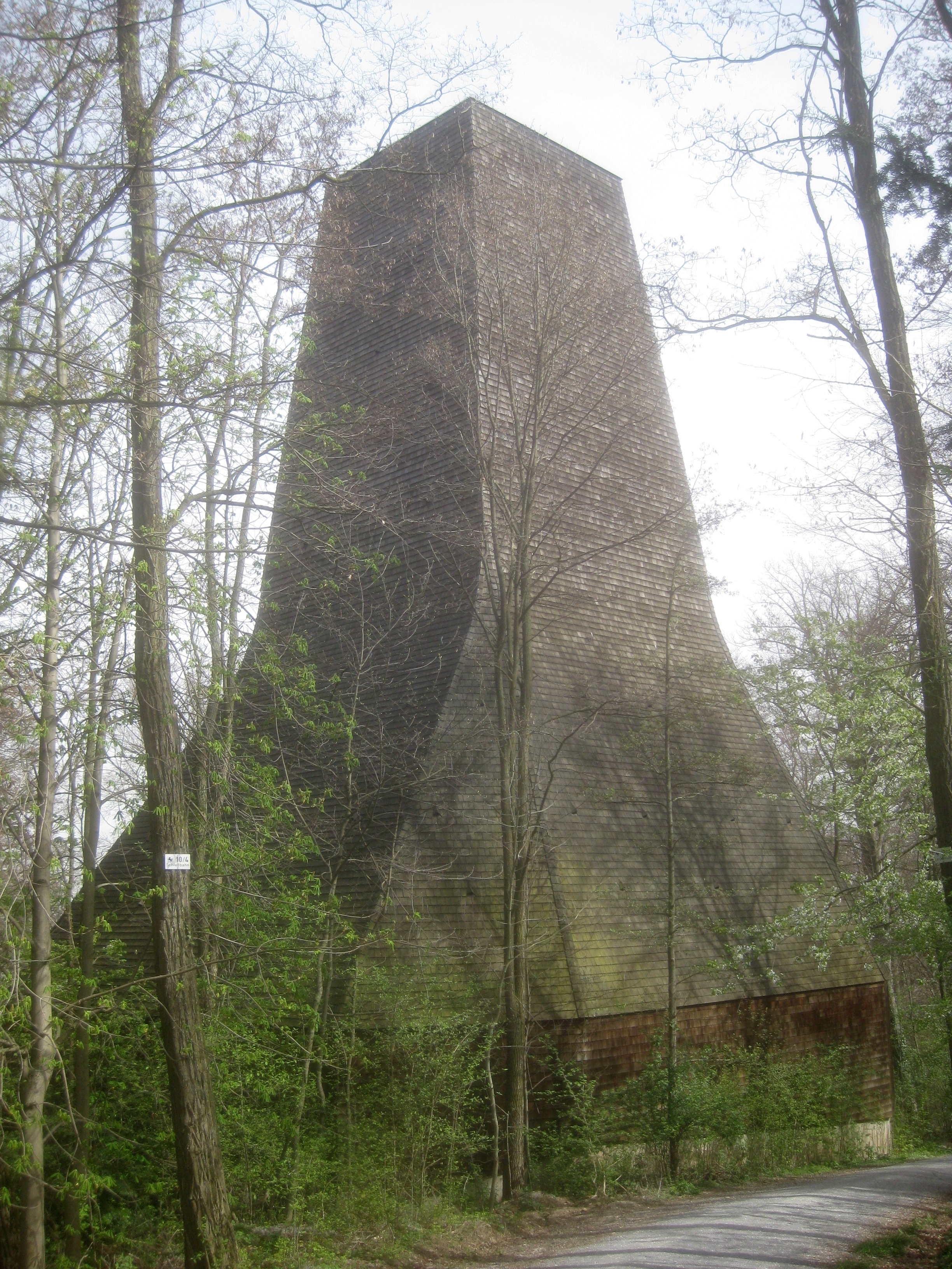 Zentraler Abluftkamin („Abluftzentrale“) des Heslacher Tunnel in Stuttgart. Ansicht von Süden (Rückseite), vom Garnisonsschützenhaus her kommend.